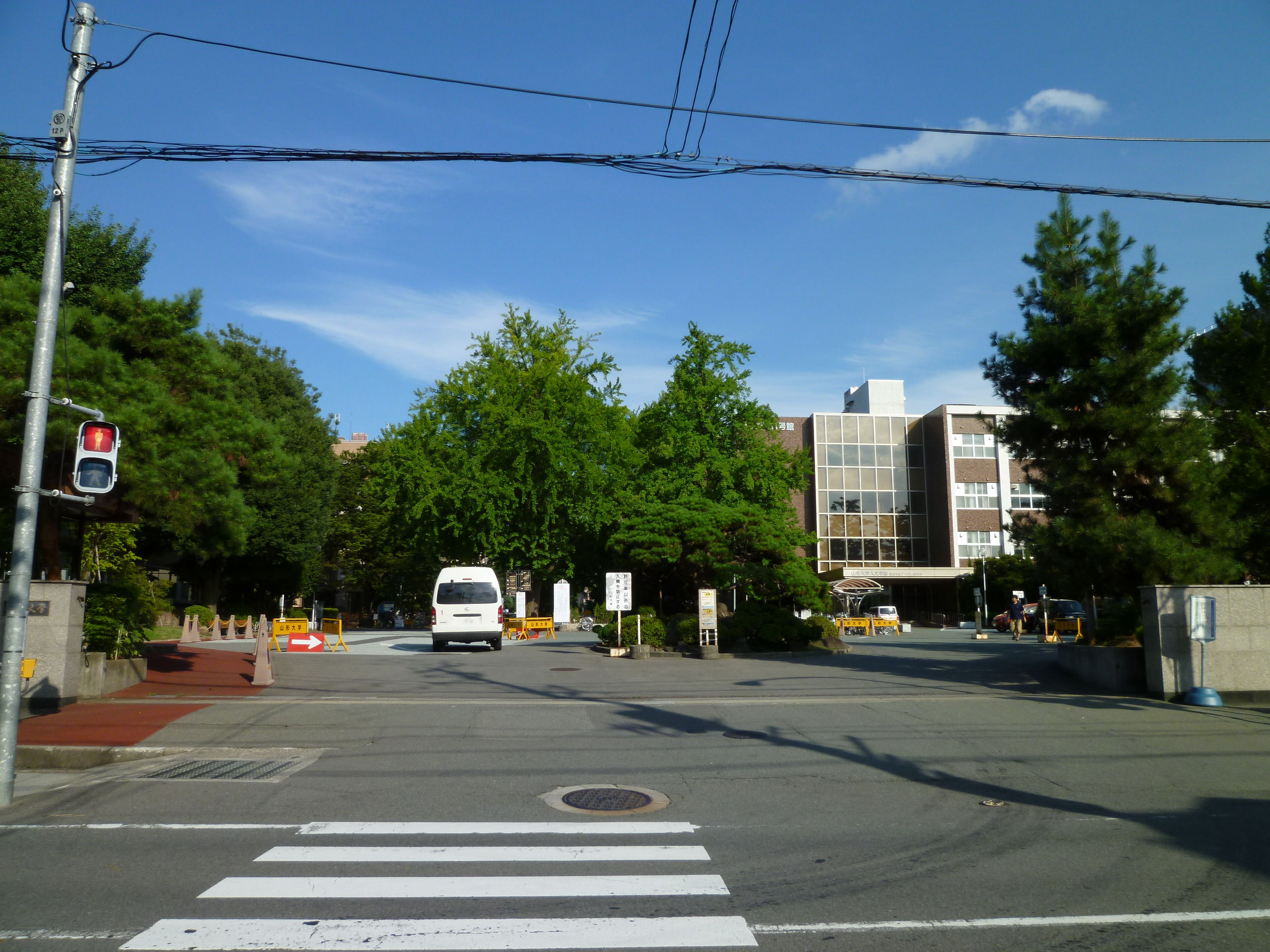 山形大学小白川キャンパス正門（山形市小白川町）